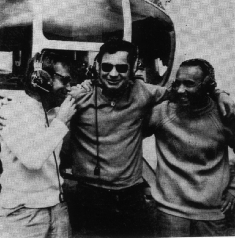 Piloti Slovaru Fabík, Nosian a technik Kločanka - Slovensko